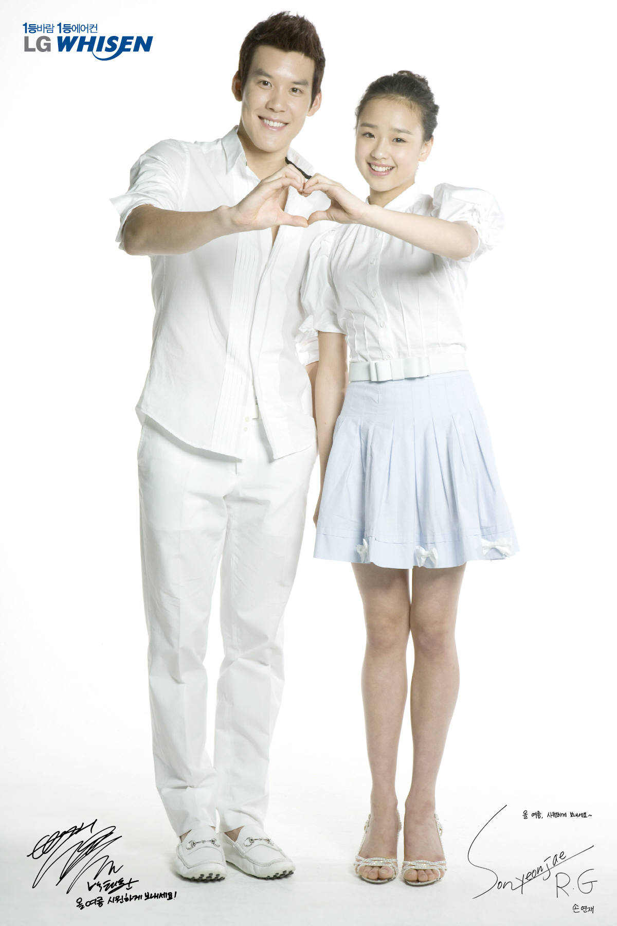 Lg whisen 손연재 지면 광고 촬영 사진 1등 바람 1등 에어컨!